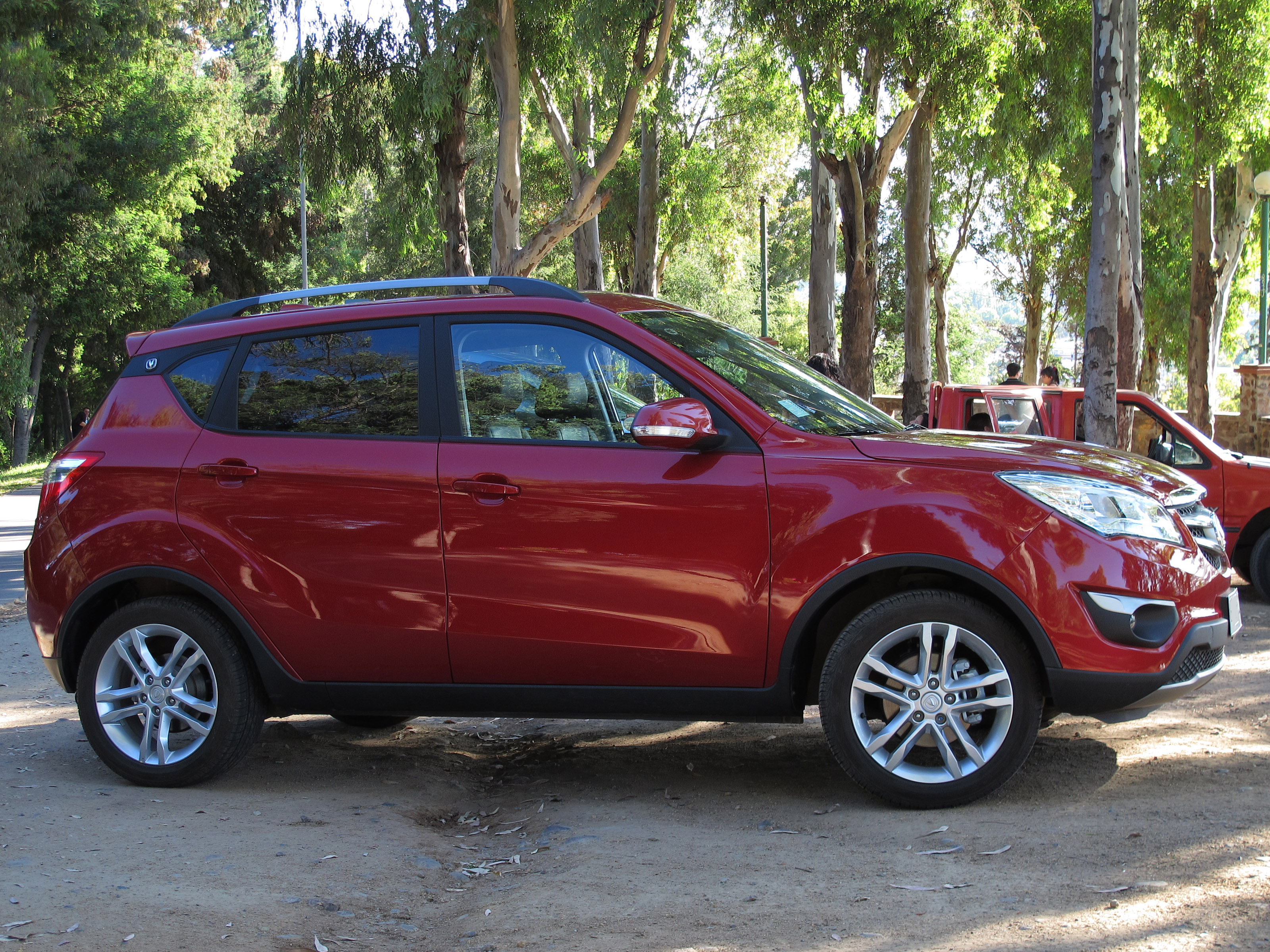 Changan CS35 1.6 Luxury 2015